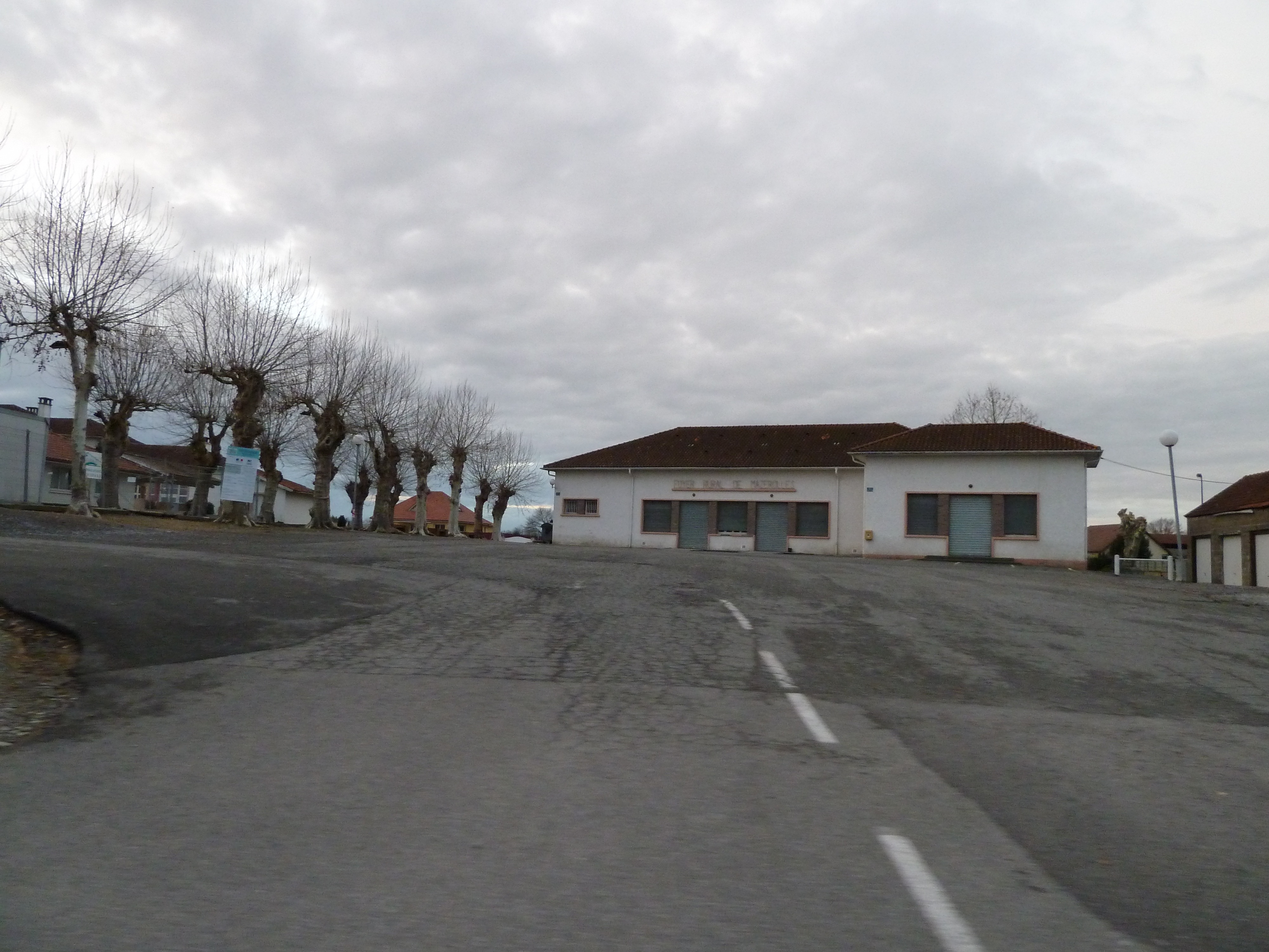 Foyer rural de Mazerolles (Pyrénées-Atlantiques)